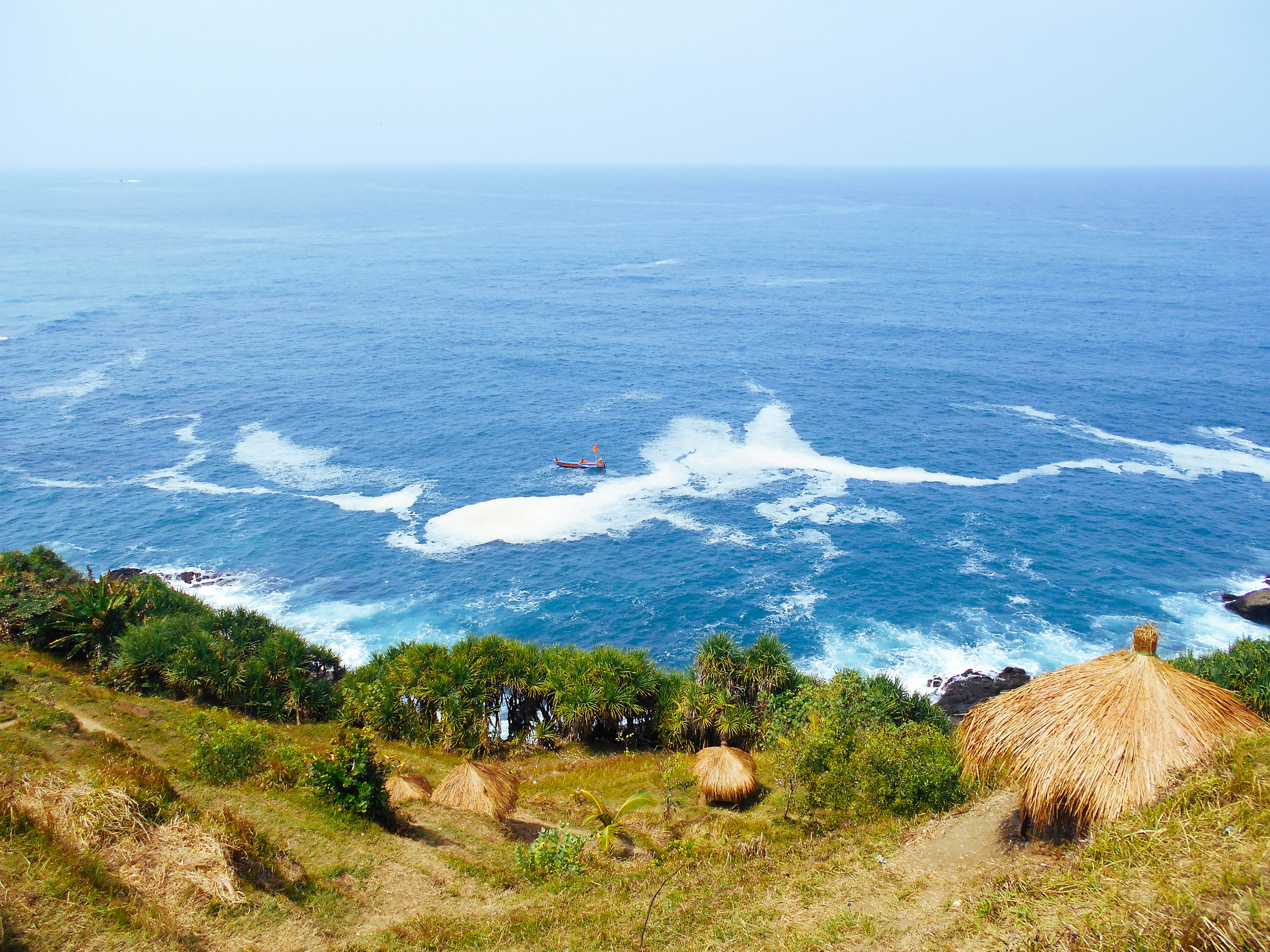 Pantai Menganti ini terletak di Desa Pasir, Kecamatan Ayah, Kebumen, Jawa Tengah. Terletak sekitar 40 km ke arah selatan dari pusat Kota Kebumen, pantai ini memiliki view langsung menghadap ke Samudera Hindia. Jika kamu berkunjung ke pantai ini jangan harap bisa berenang di pinggir pantainya, karena pantai ini memiliki karakteristik batu karang yang banyak dan ombak yang sangat berbahaya. Namun kita masih dapat menikmati pantai ini dengan bersantai di saung-saung bambu kecil, memancing ataupun camping untuk menikmati sunset. Yuk berwisata ke Pantai Menganti!!